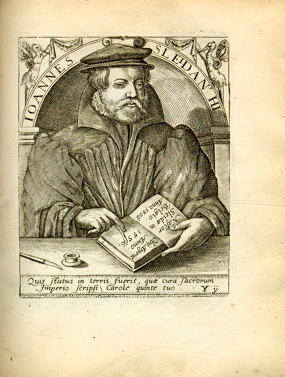 Johannes Sleidanus (* 1506; † 1556), deutscher Jurist und Diplomat